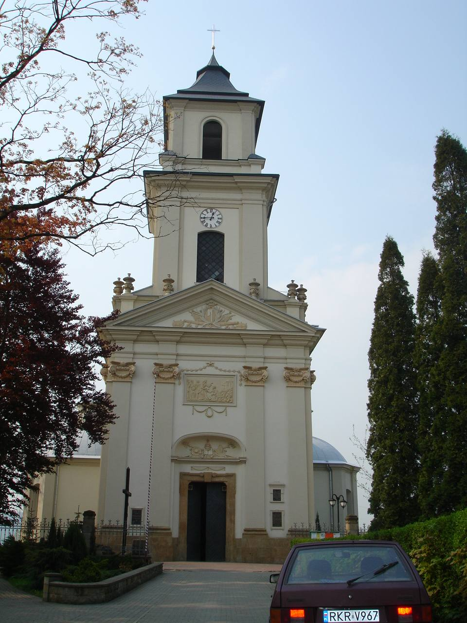 kościół parafiany w Rymanowie nad drzwiami herb Ossolinskich - Topór